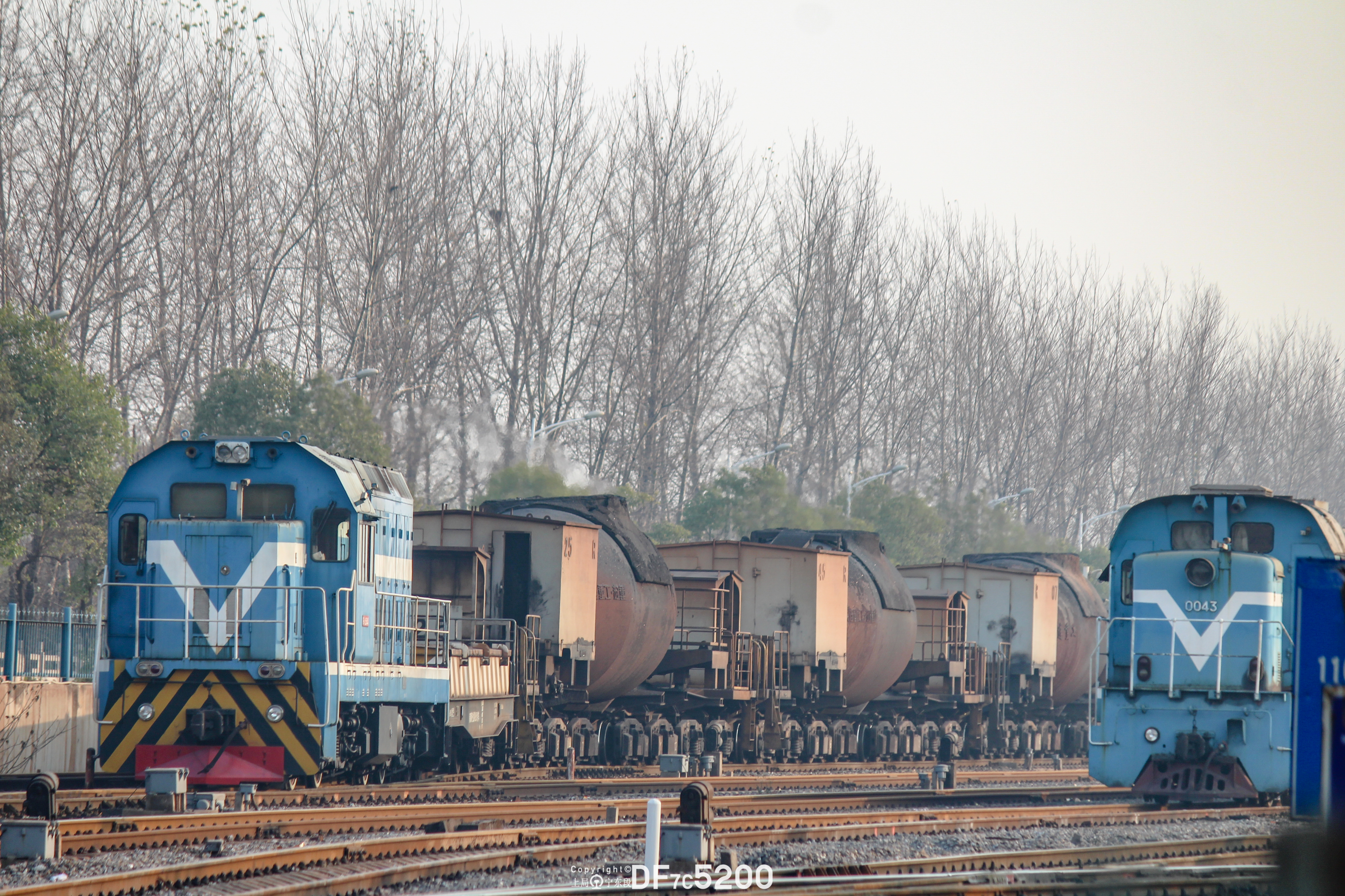 南钢集团的GK1C型内燃机车正在进行调车作业